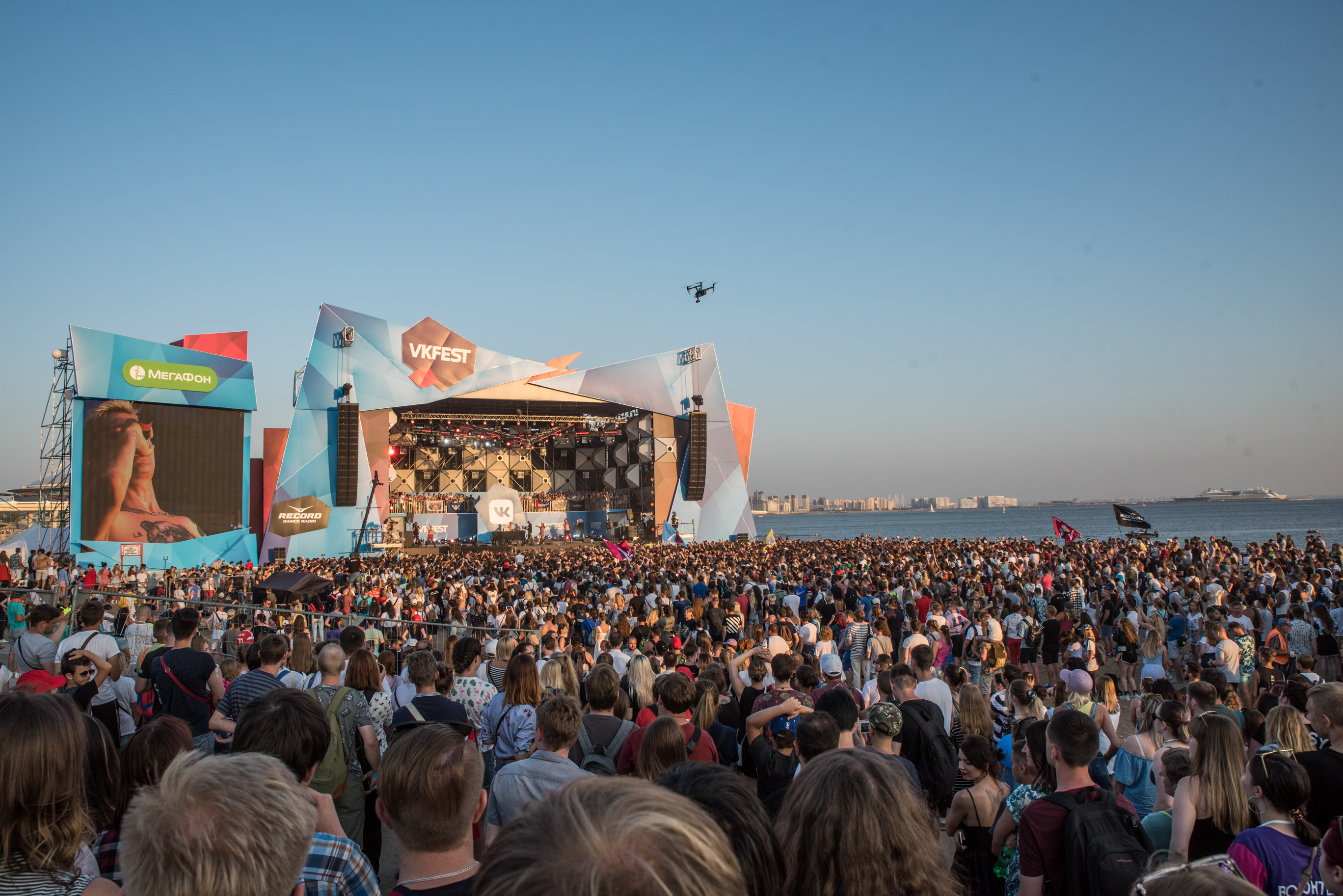 Зрители у Синей сцены на VK Fest 2018